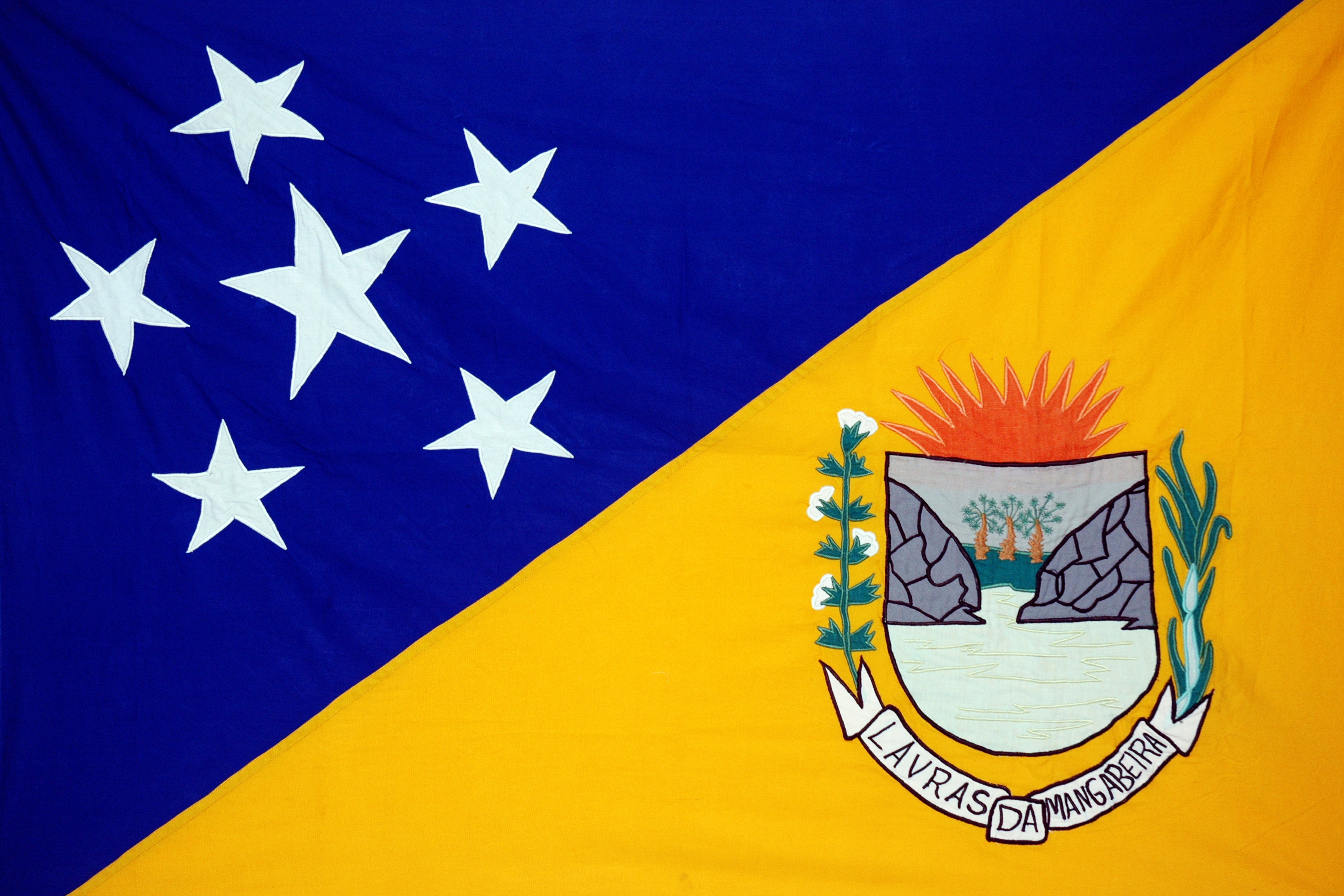 Bandeira de Lavras de Mangabeira